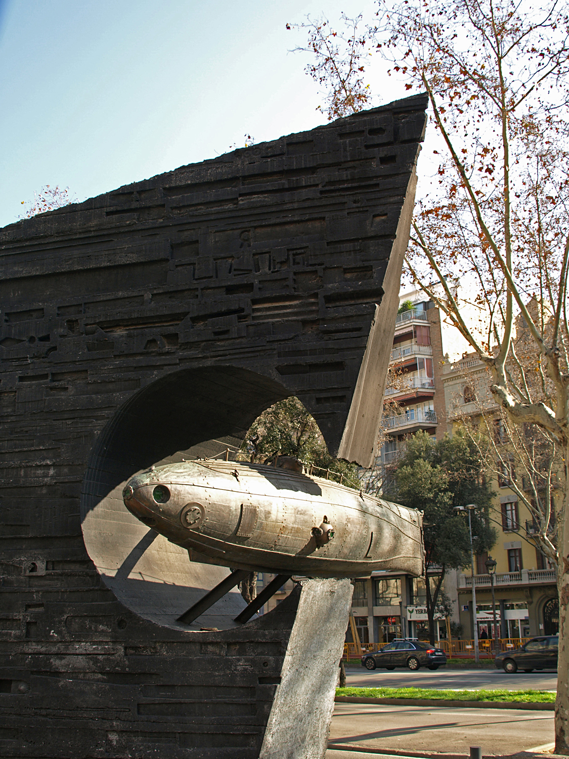 La Cara de Barcelona (Josep María Subirachs, 1963)